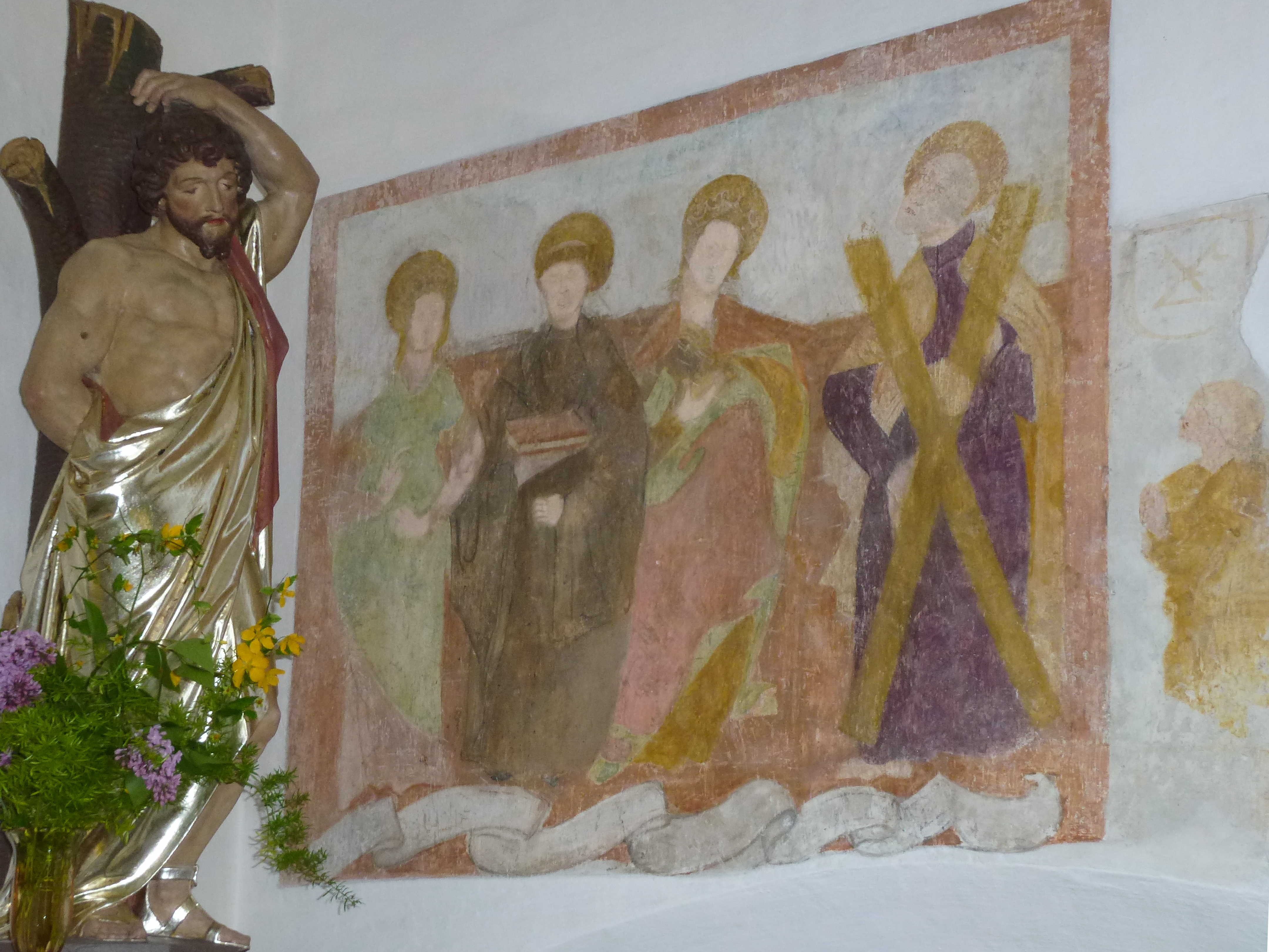 Oberpfaffenhofen (Gde Weßling), Gautinger Str.44: Katholische Kirche St. Georg, freigelegtes Fresko